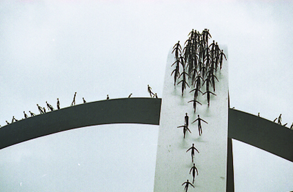 Bronzefiguren "Läufer" des Künstlers Lutz Bernsau